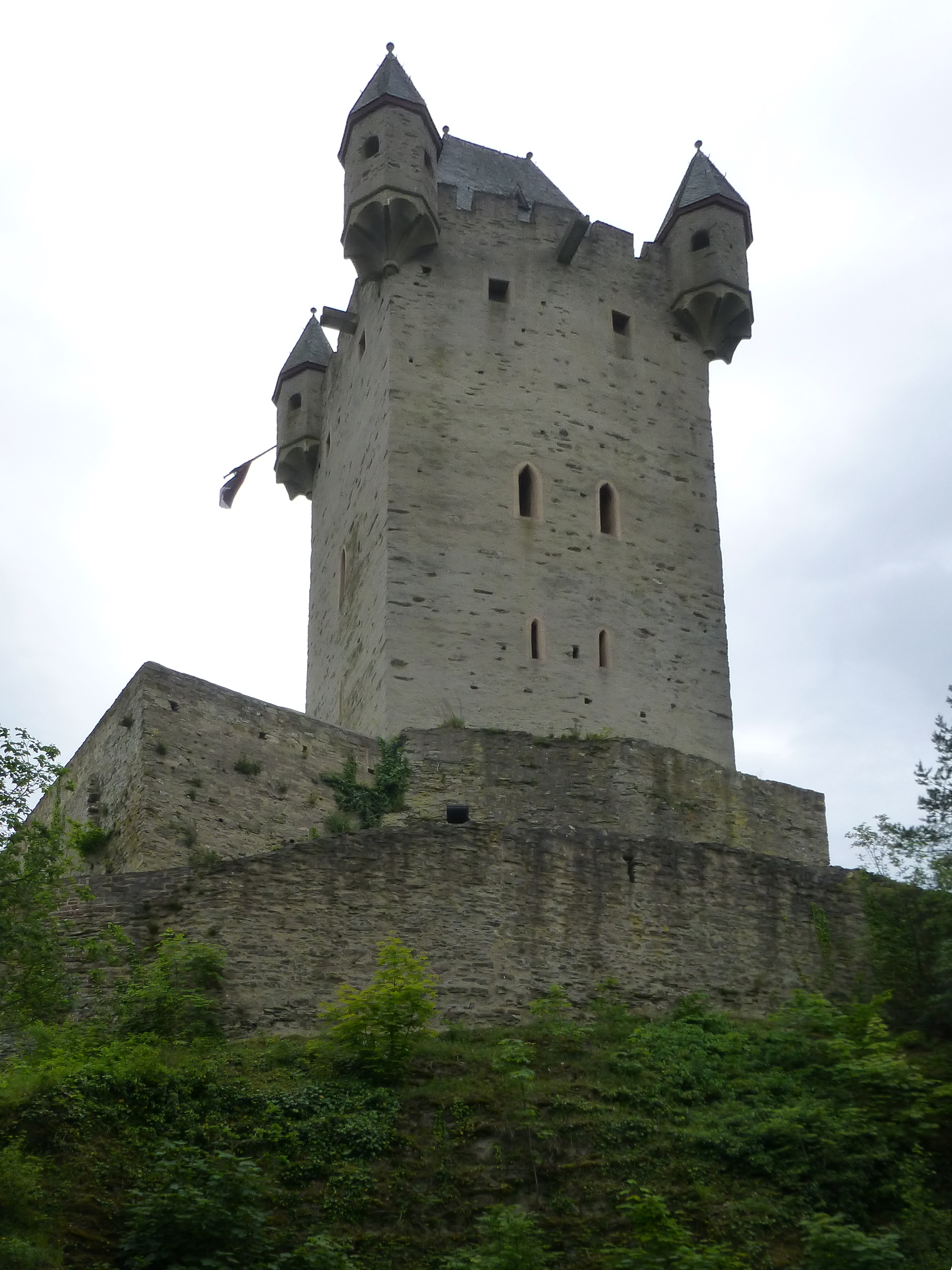 Burg Nassau mit Bergfried; Ansicht der Nordwestseite vom Parkplatz unterhalb der Burg